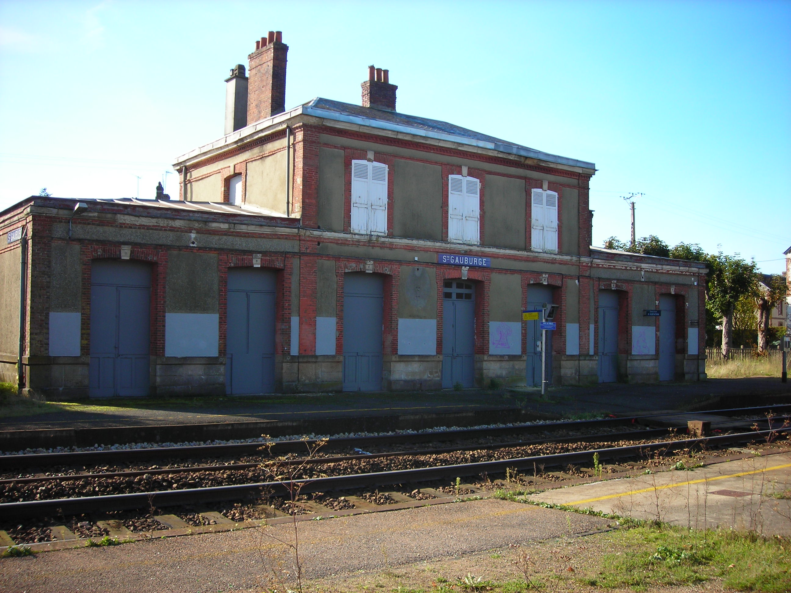 Gare de Sainte-Gauburge-Sainte-Colombe vue de coté quaie (Orne, France)